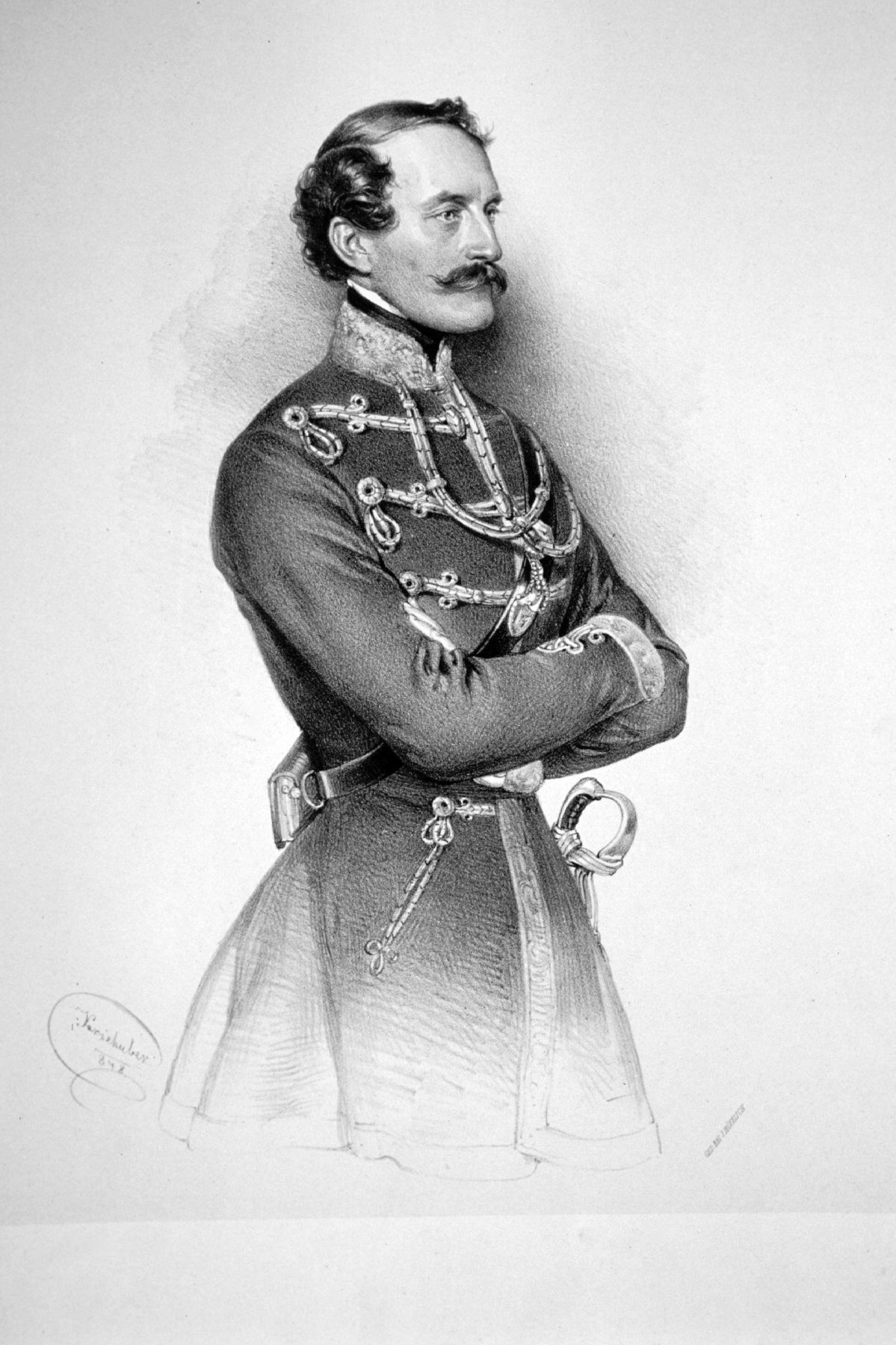 Ferdinand Freiherr von Langenau (1818-1881) Geneal der Kavallerie, Geheimrat, Botschafter in Stockholm, DenHag, St. Petersburg